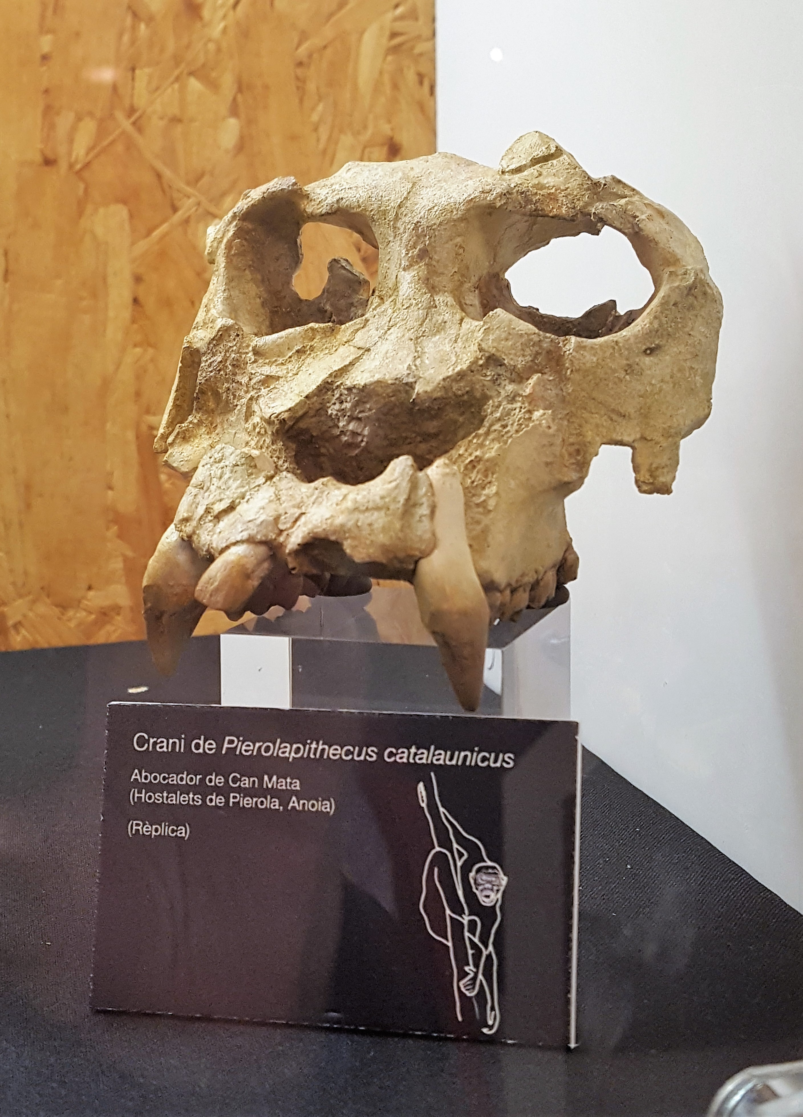 Pierolapithecus catalaunicus (Rekonstruktion, Museum des Instituto de Paleontología Miquel Crusafont in Sabadell. )